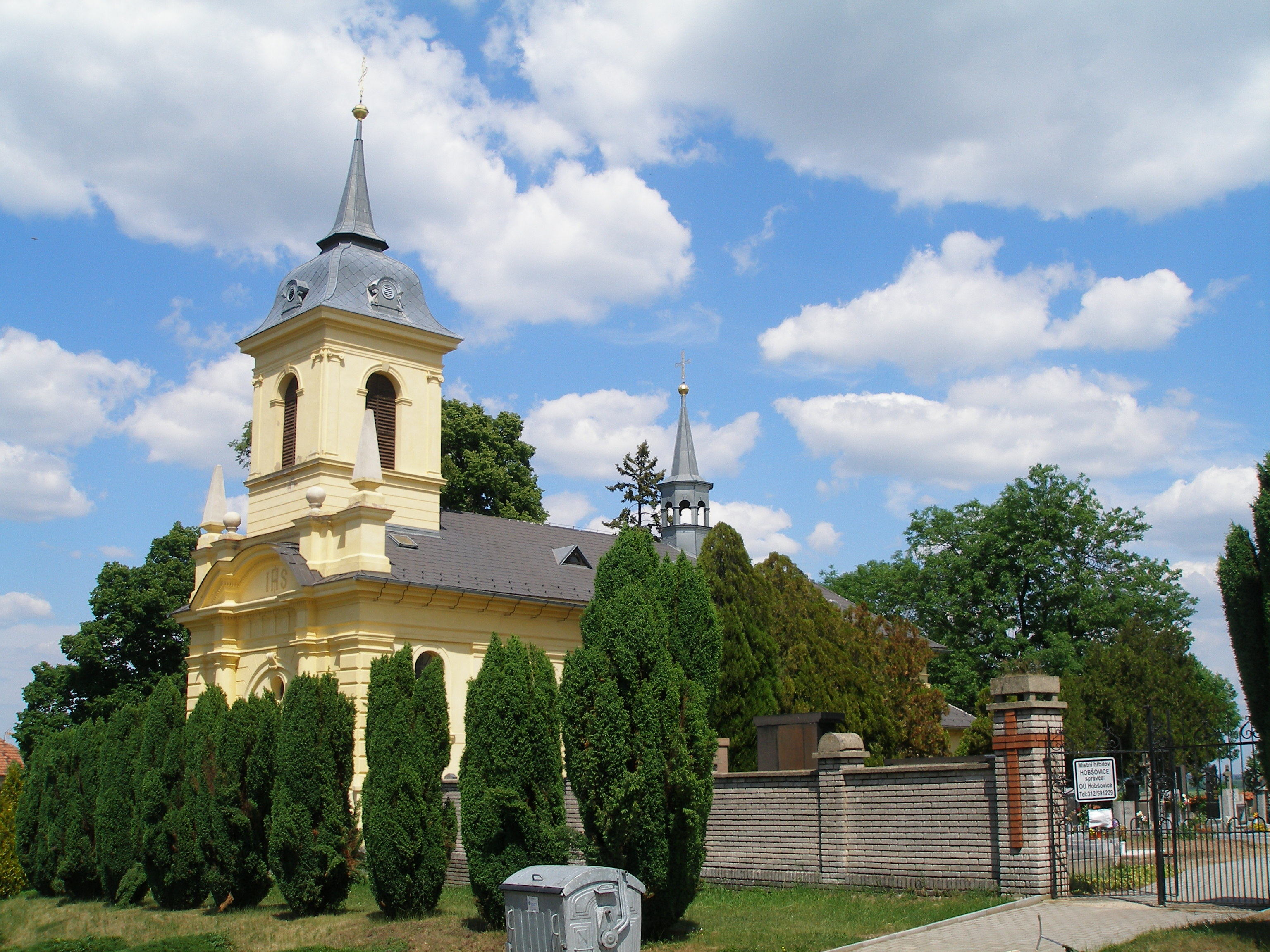 Kostel svatého Václava v Hobšovicích.